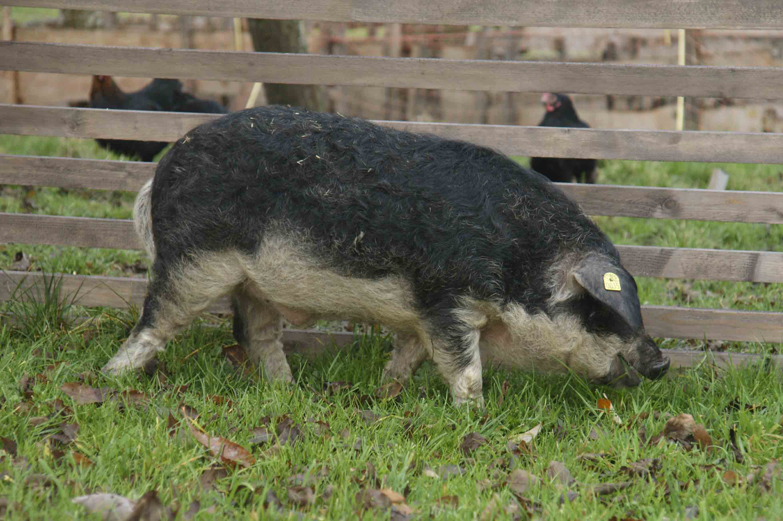 Mangalica, Wollschwein, Eber